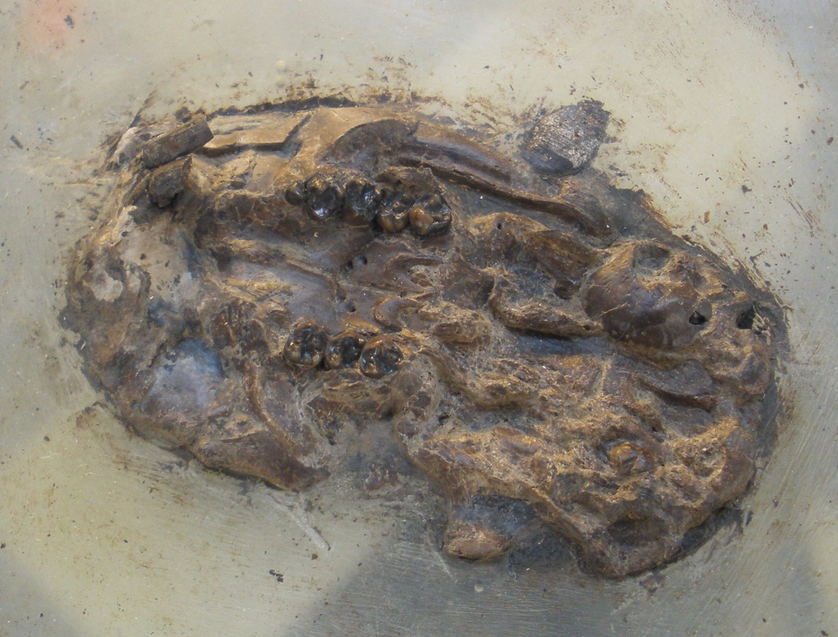 Fossil of Ailuravus, an extinct rodent Took the photo at Musee d'Histoire Naturelle, Brussels